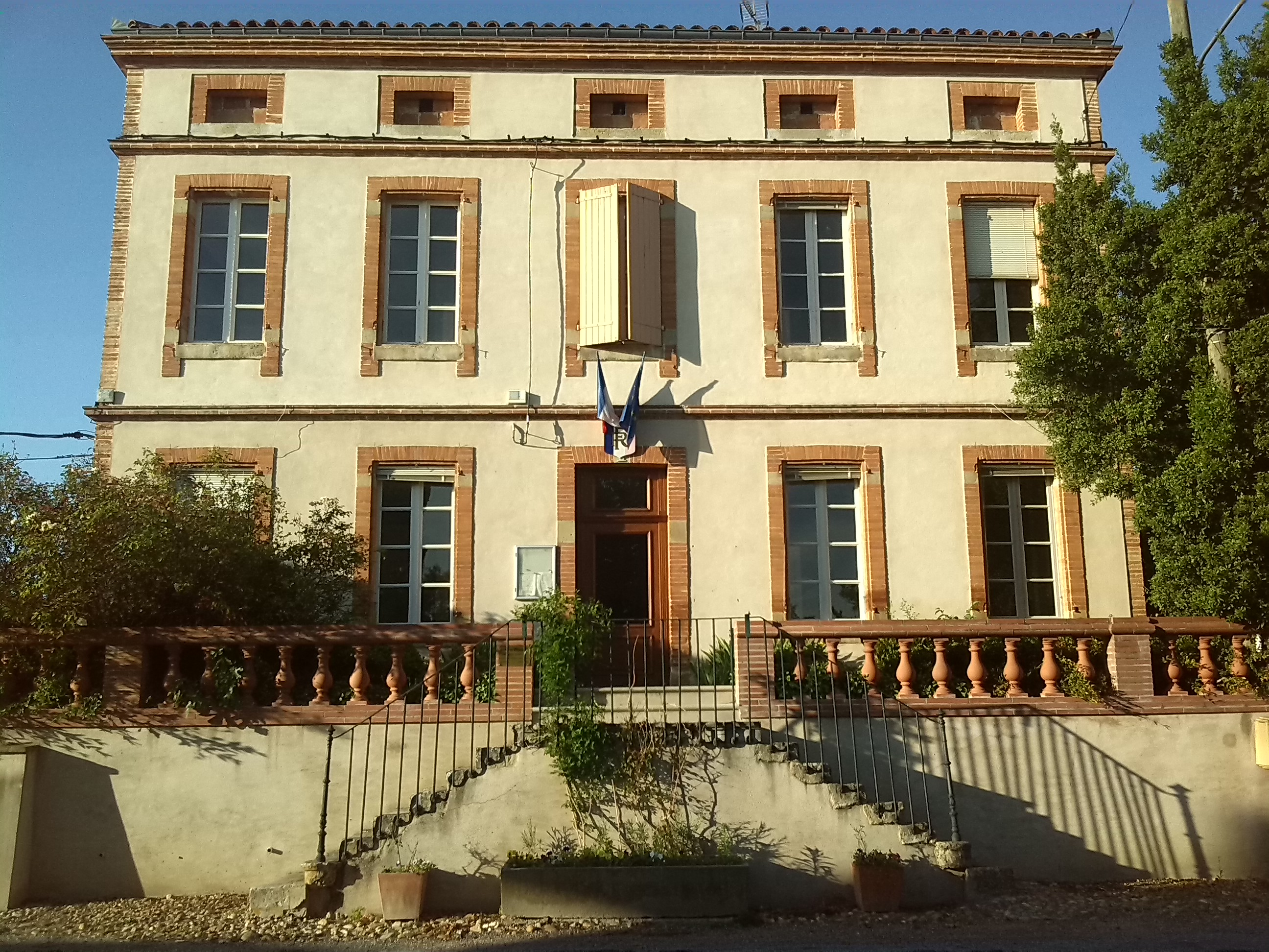 Urbodomo de Belcastel